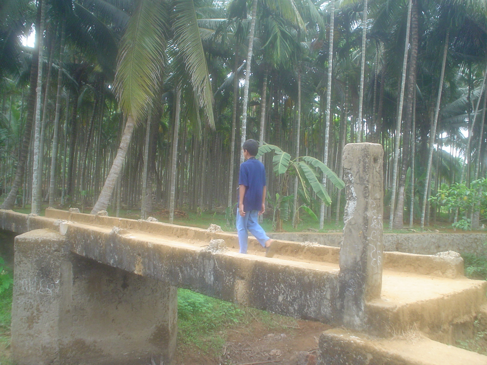 ചേറൂരിനെ പൂച്ചോലമാടുമായി ബന്ധിപ്പിക്കുന്ന ചേറൂർ പാലം.